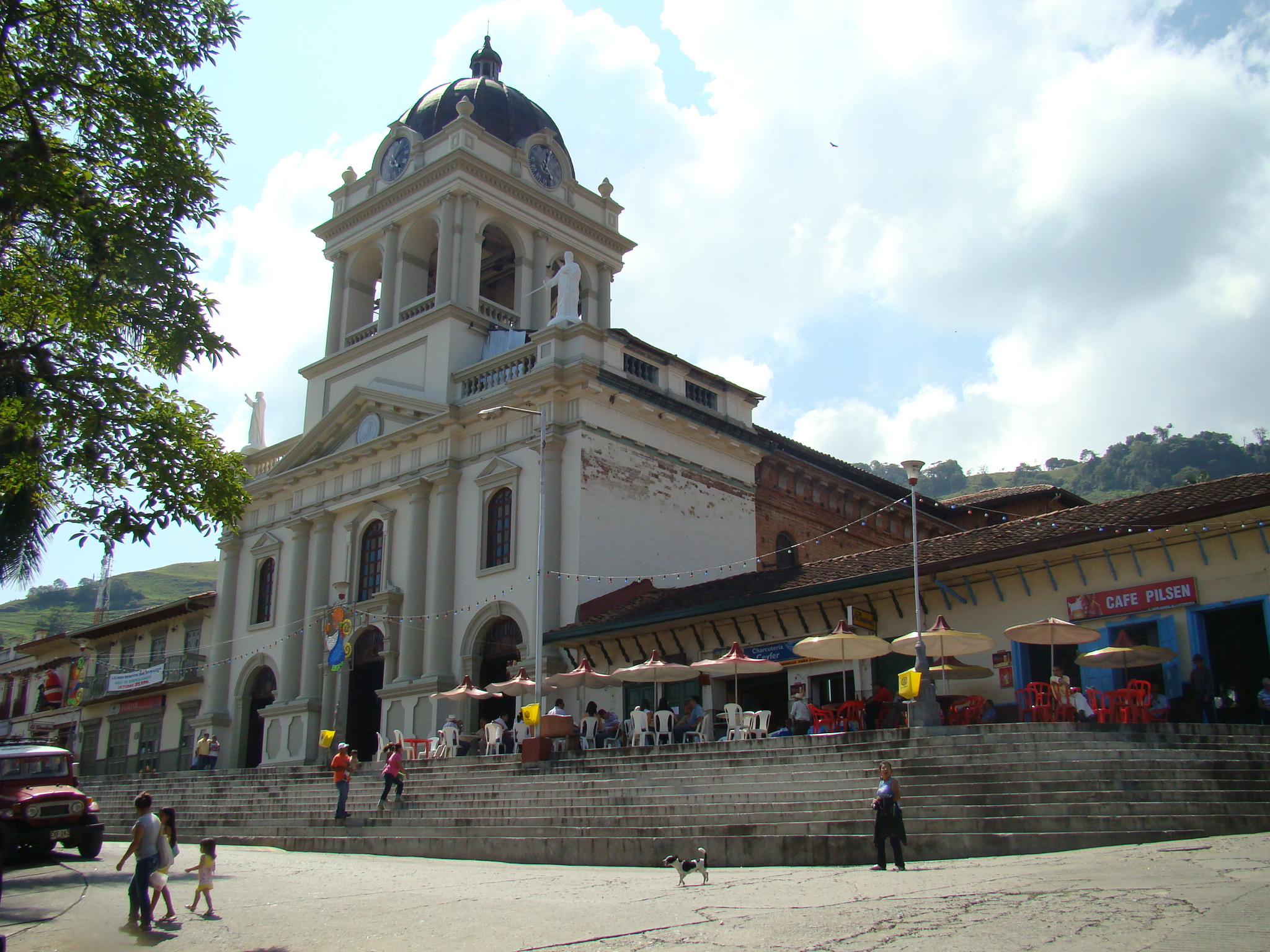 Aspecto exterior de la iglesia principal de Titiribí y su atrio.